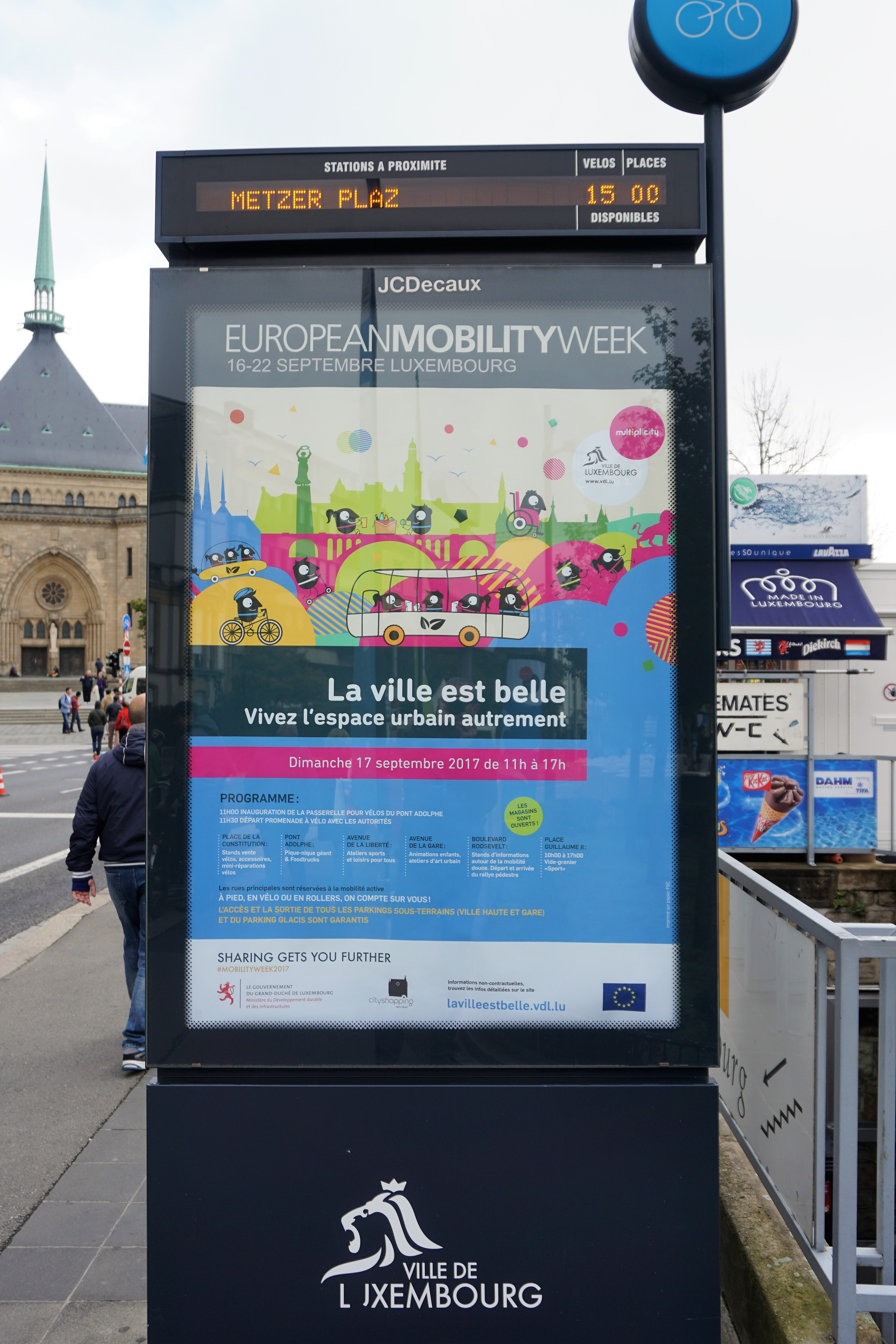 "La ville est belle" dans le cadre de la Semaine européenne de la mobilité à Luxembourg.